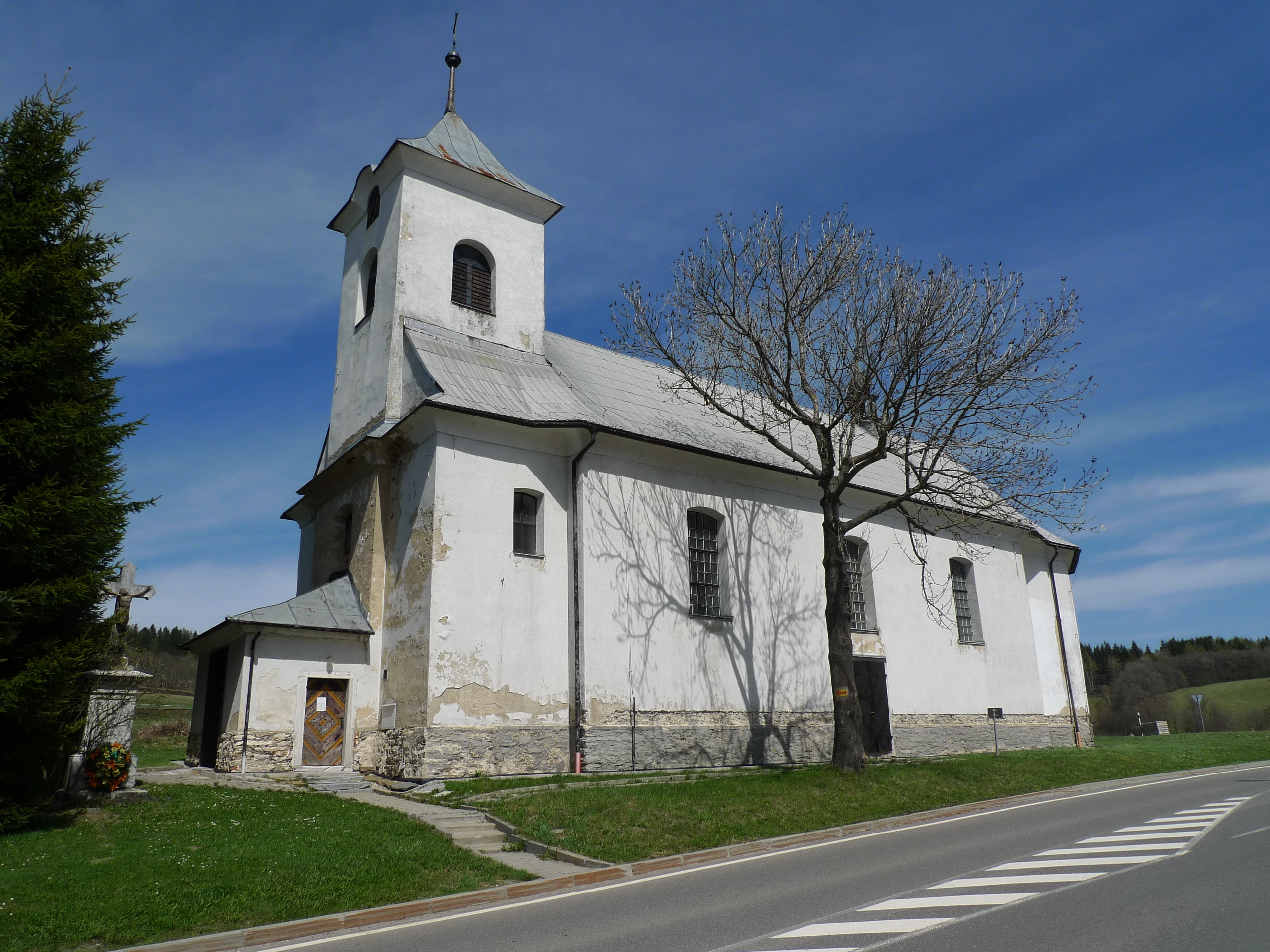 Kostel v Ostružné, okres Jeseník.